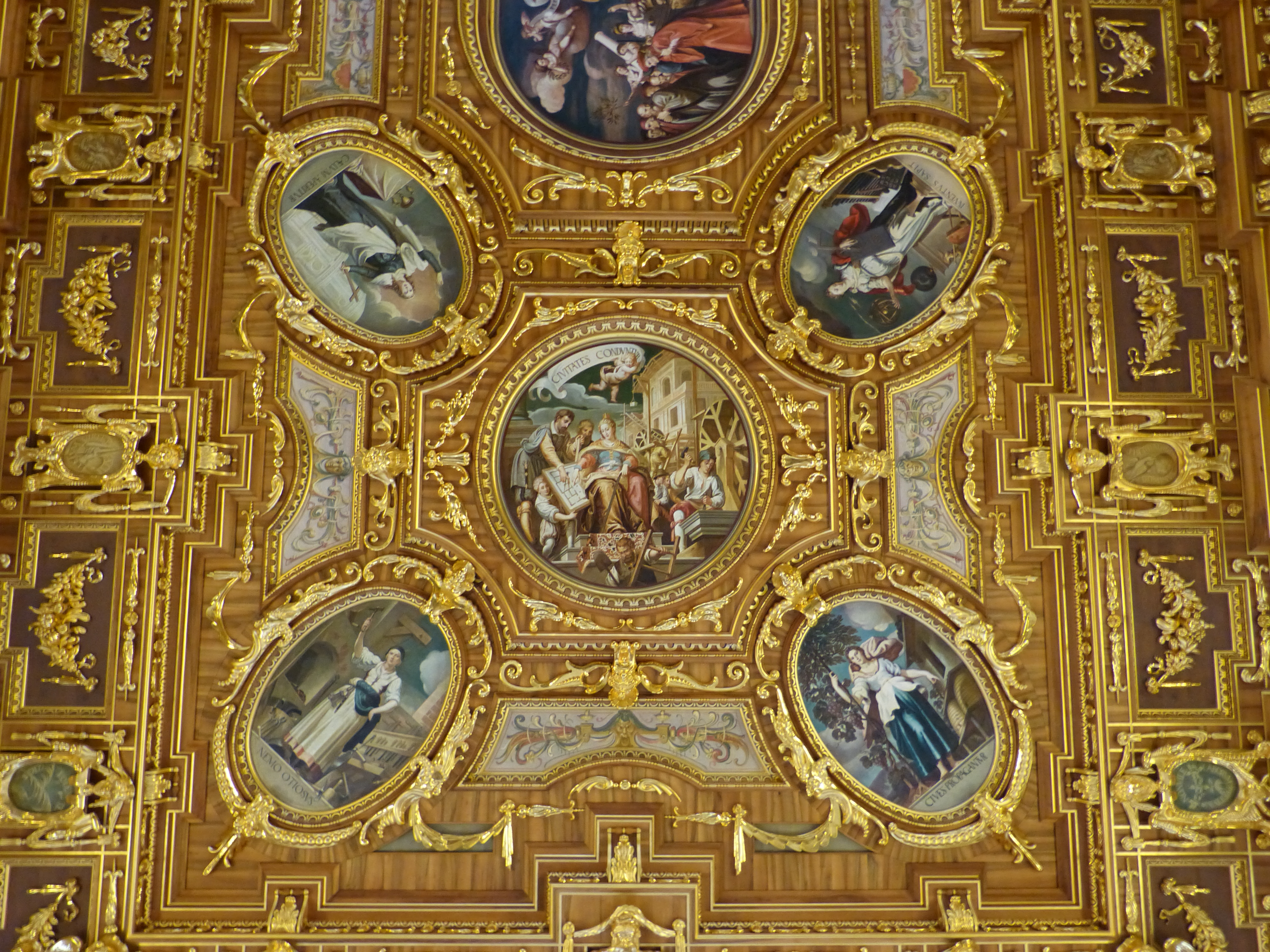 Goldener Saal, Rathaus in Augsburg, Bayern